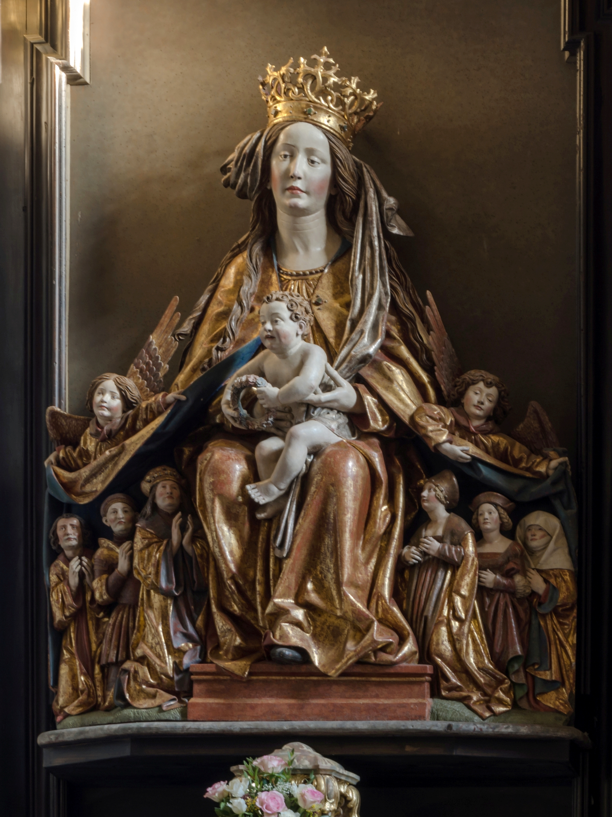 Wallfahrtskirche Mariä Heimsuchung und Friedhof